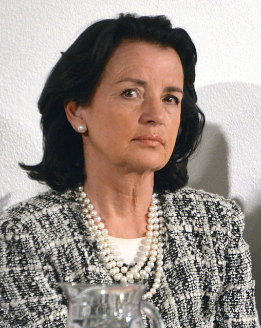 Anne Ramberg, generalsekretare i Advokatsamfundet, deltar i ett seminarium om hur har synen på tortyr ändrats under tiden från terrorattackerna den 11 september år 2001. Arrangör: Amnesty Internationals Juristgrupp i samarbete med Bibliotek Plattan. Plats: Forum/Debatt, Plattanscenen, Kulturhuset Stadsteatern i Stockholm den 6 mars 2014.